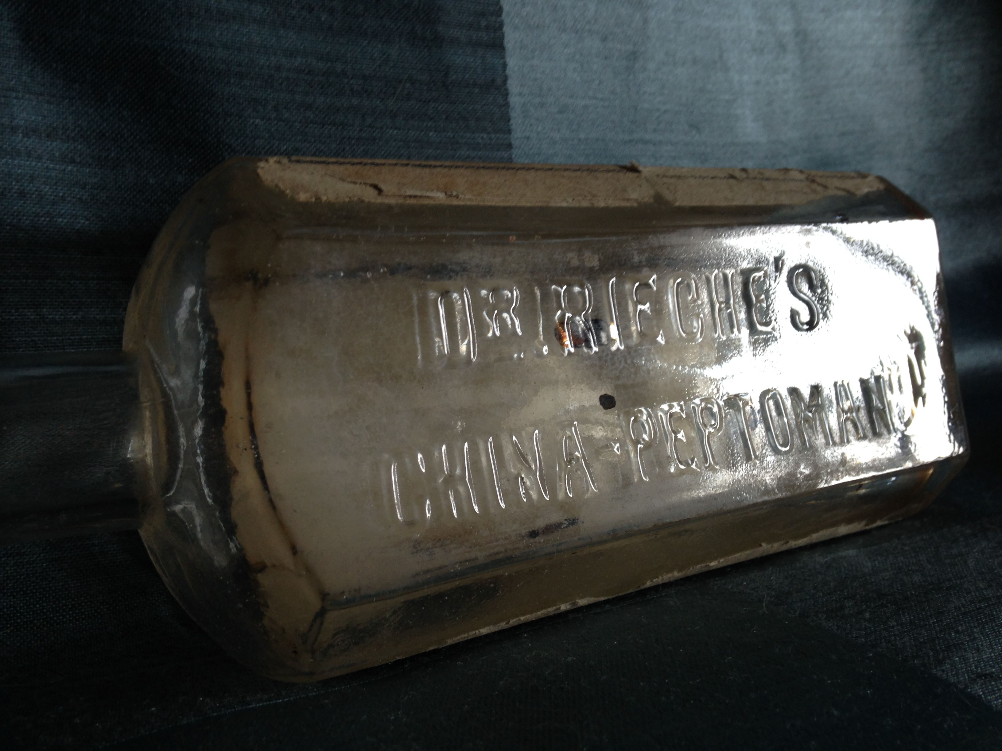 Dr. Rieche's China-Peptoman (Flasche, Seite 3), historisch ca. 1910 bis 1919